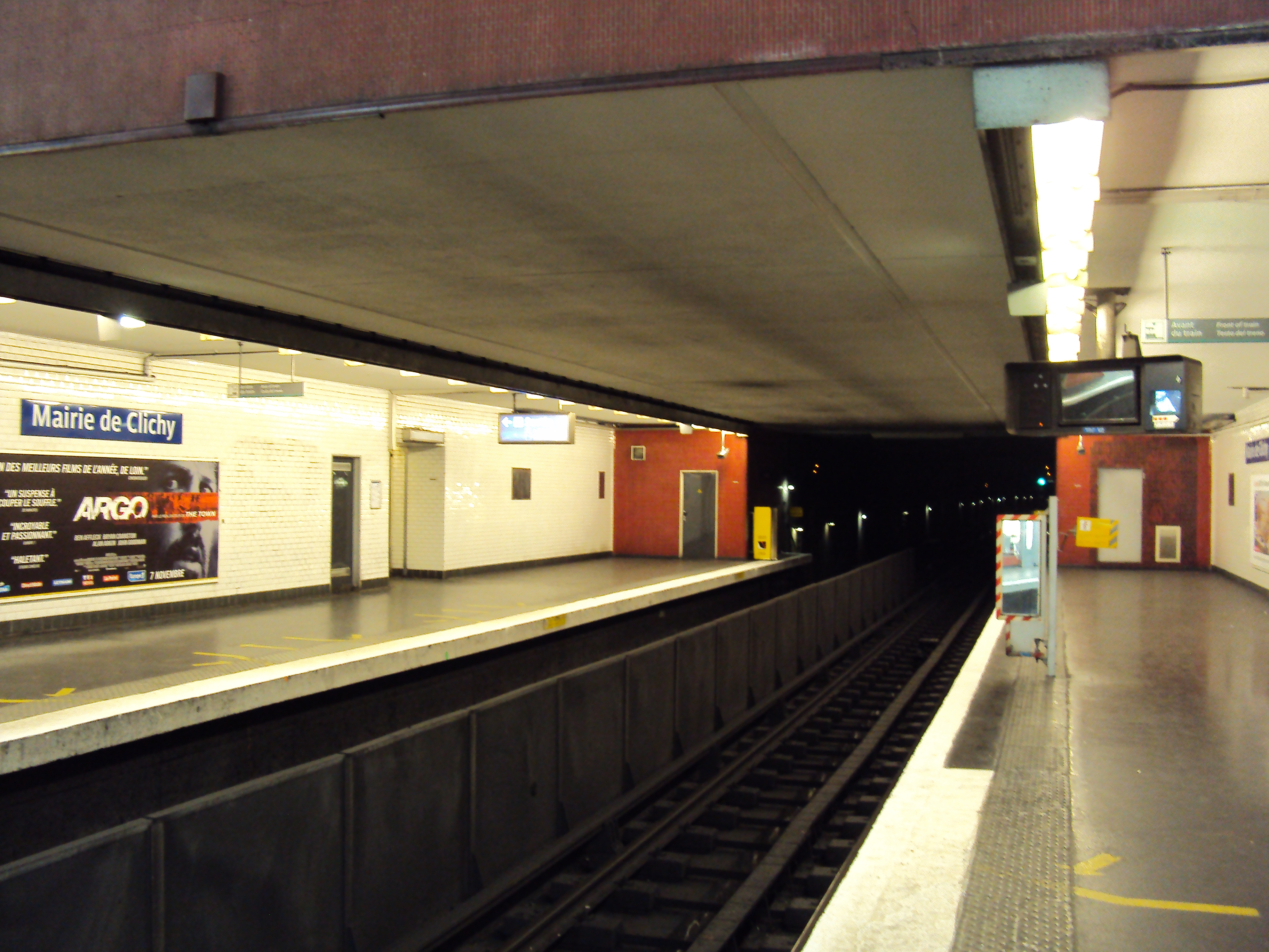 Station de metro Mairie de Clichy